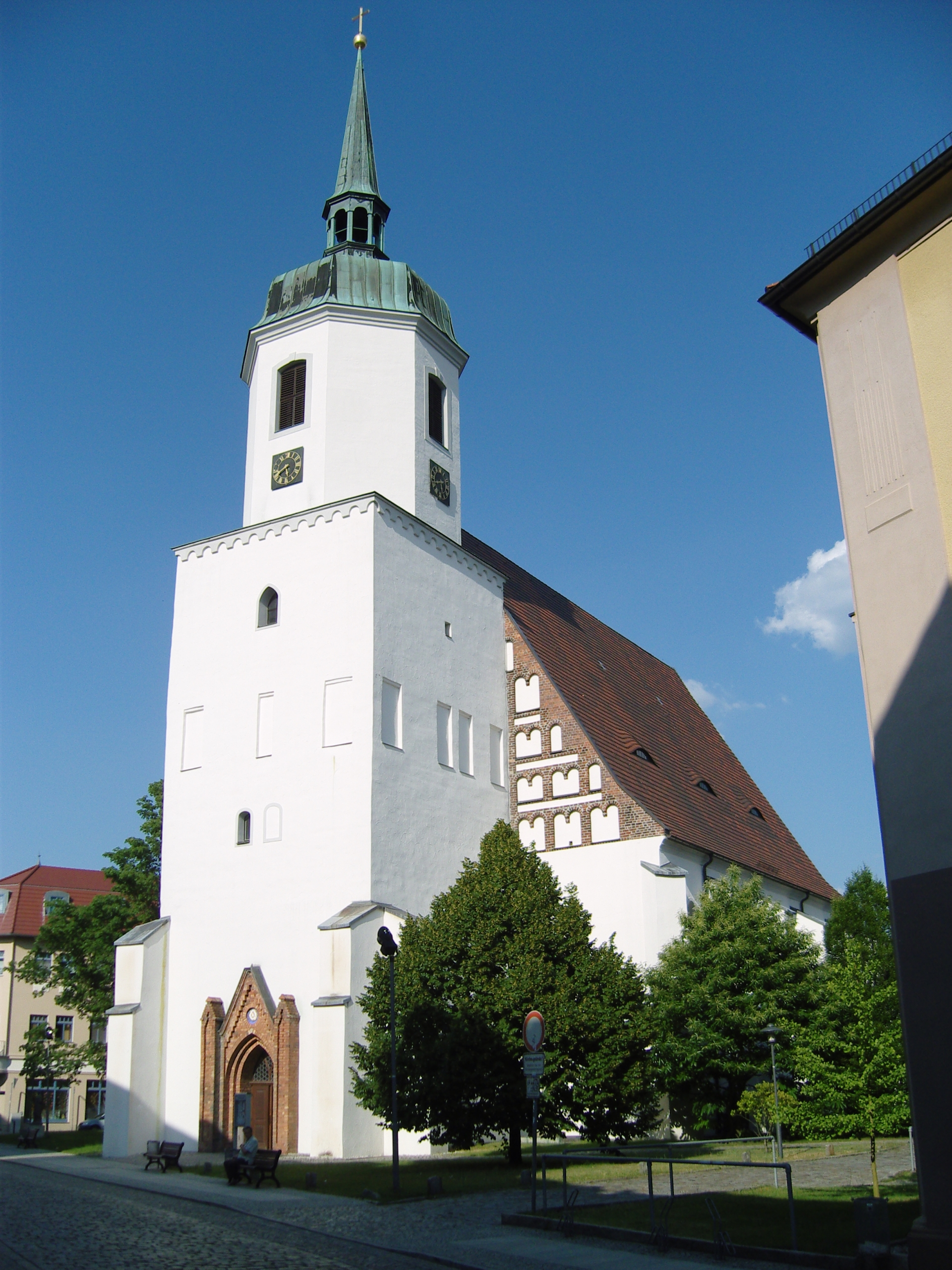 Johanniskirche Hoyerswerda